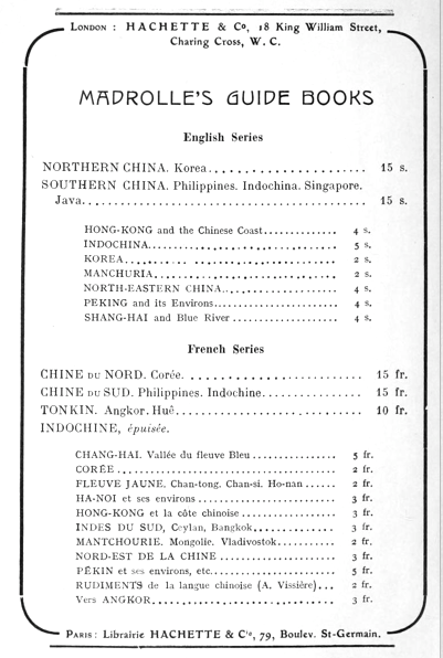 Advertisement for Guides Madrolle